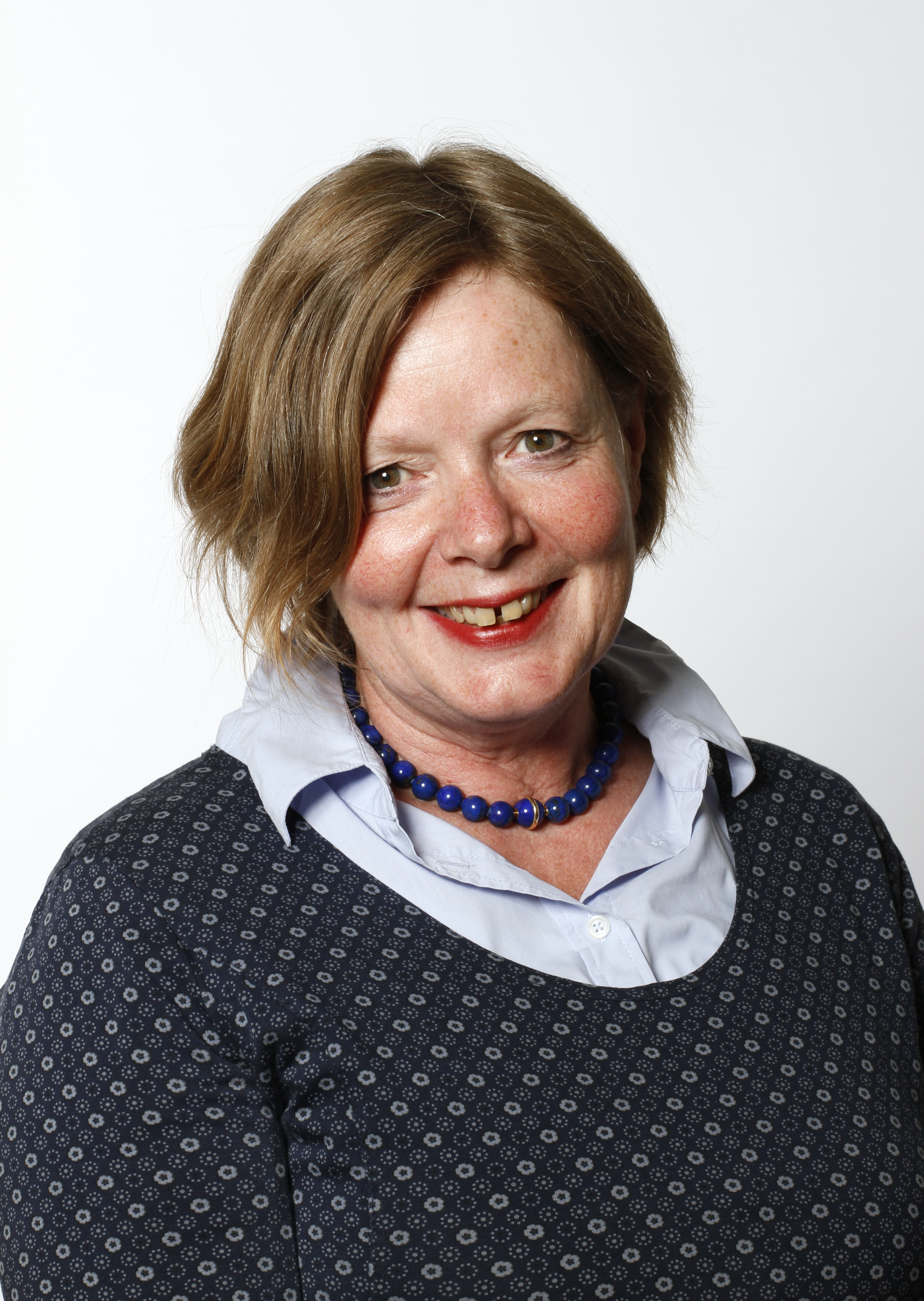 Marlies Fritzen im Portrait